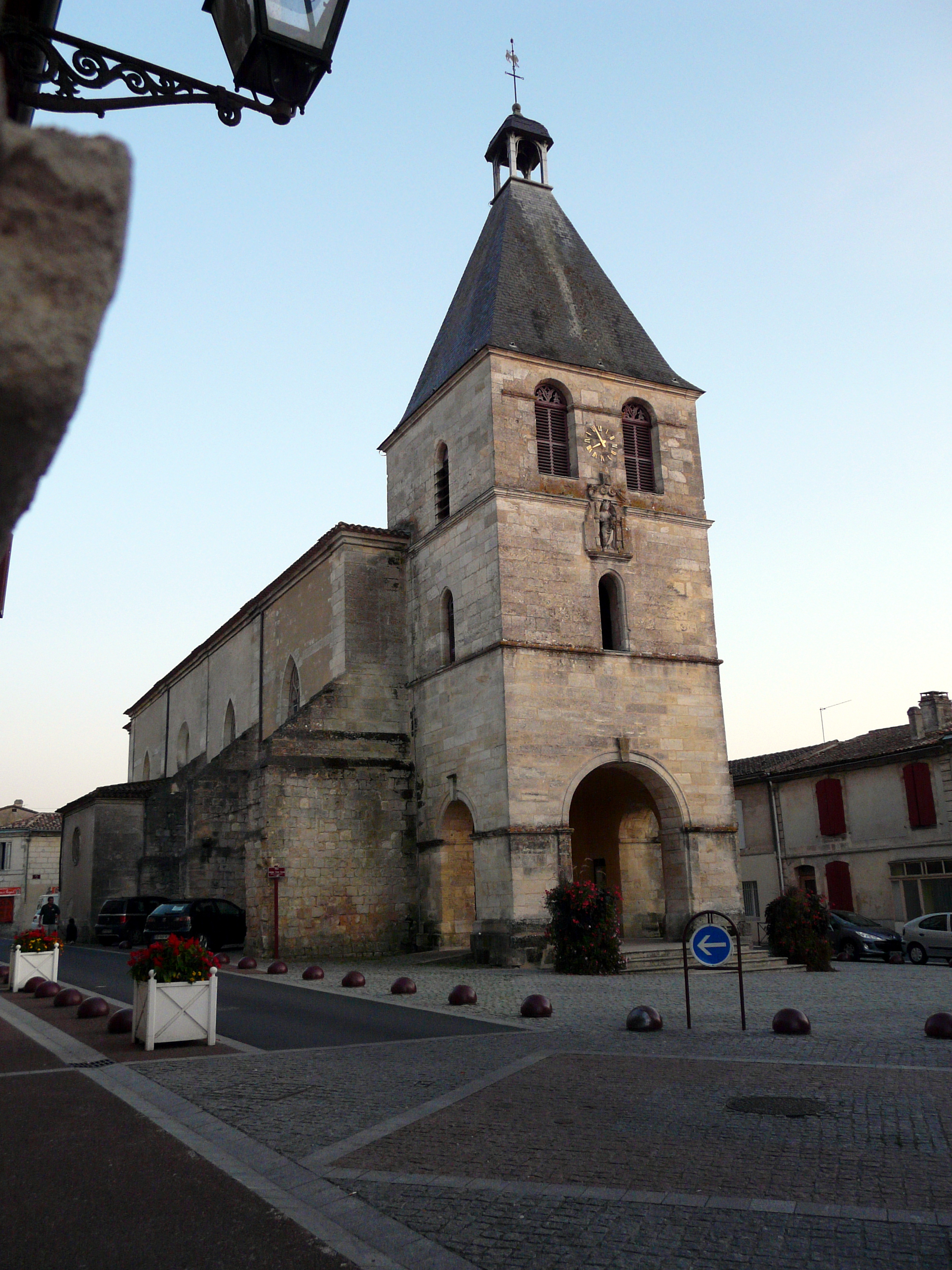 Façade de Notre-Dame de Créon, Gironde, France. .